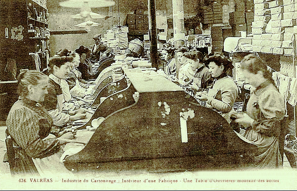 Atelier de cartonnage à Valréas au début du XXe siècle